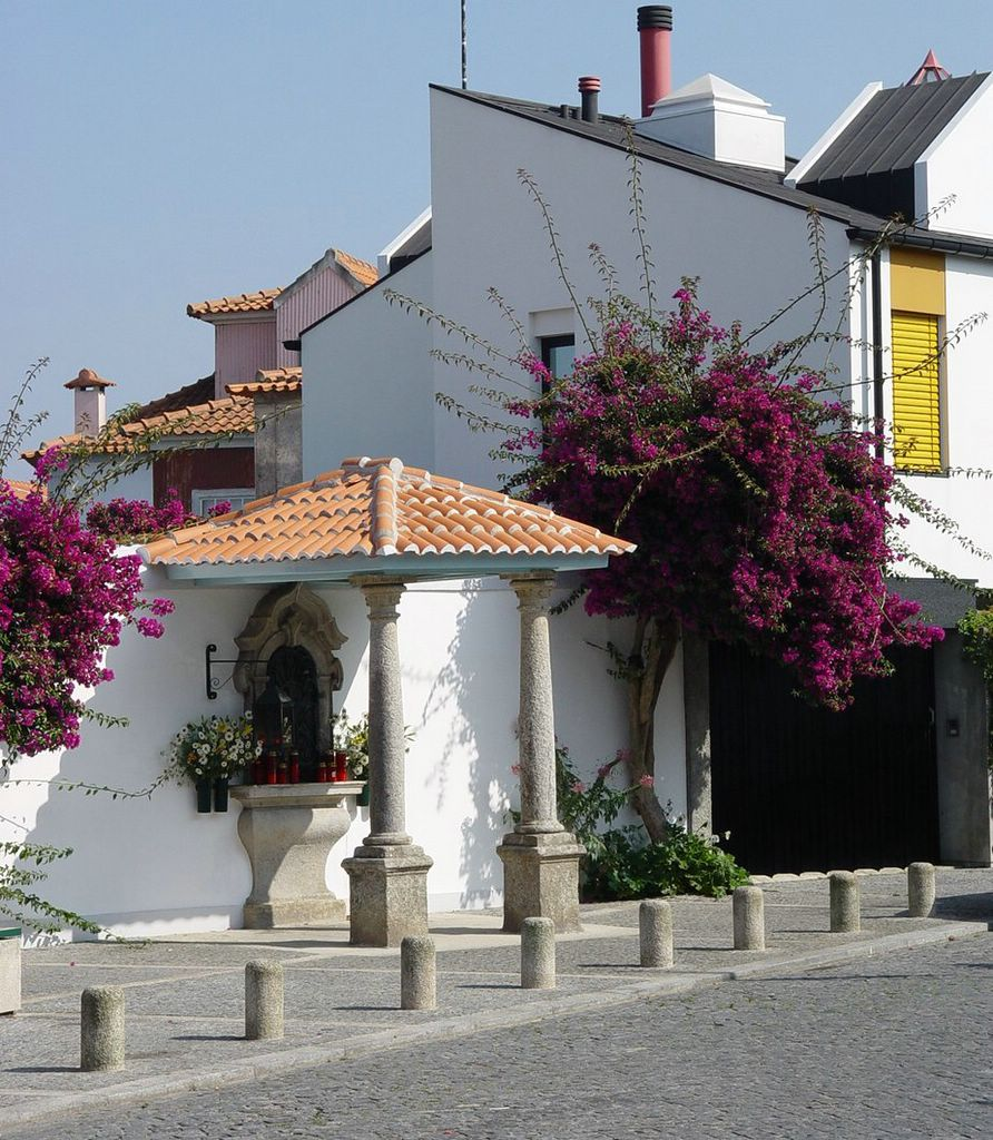 alminha do cais em fão, patrimonio religioso em esposende, braga portugal